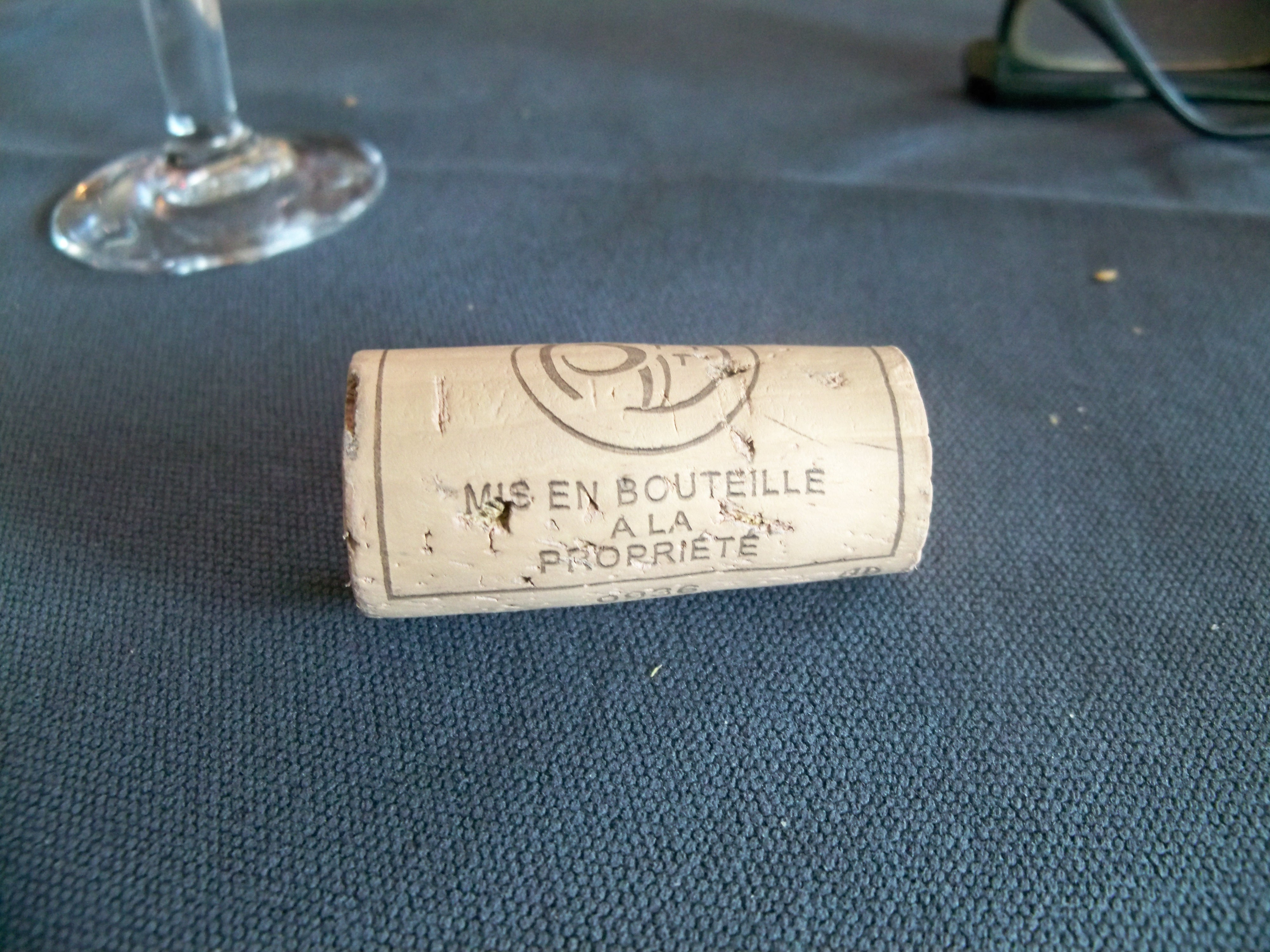 Bouchon, mention "mise en bouteille à la propriété"